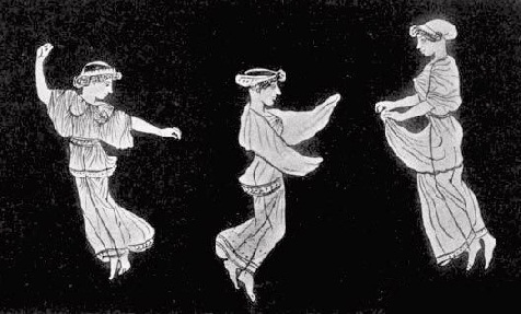 Ninfas volando